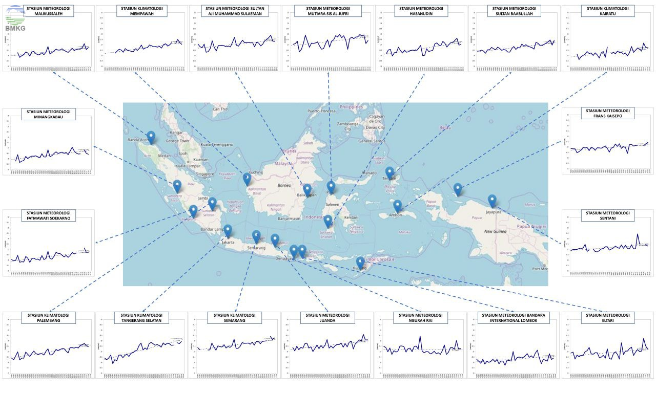 Tren suhu berikut diperoleh dengan menggunakan data observasi BMKG mulai dari tahun 1981-2018. Berdasarkan hasil pengolahan tren suhu di Indonesia secara umum suhu di Indonesia baik suhu minimum, rata-rata, dan maksimum memiliki tren yang bernilai positif dengan besaran yang bervariasi sekitar 0.03 °C setiap tahunnya. Ini bisa diartikan bahwa suhu akan mengalami kenaikan 0.03 °C setiap tahunnya sehingga dalam 30 tahun lokasi tersebut akan mengalami kenaikan sebesar 0.9 °C.